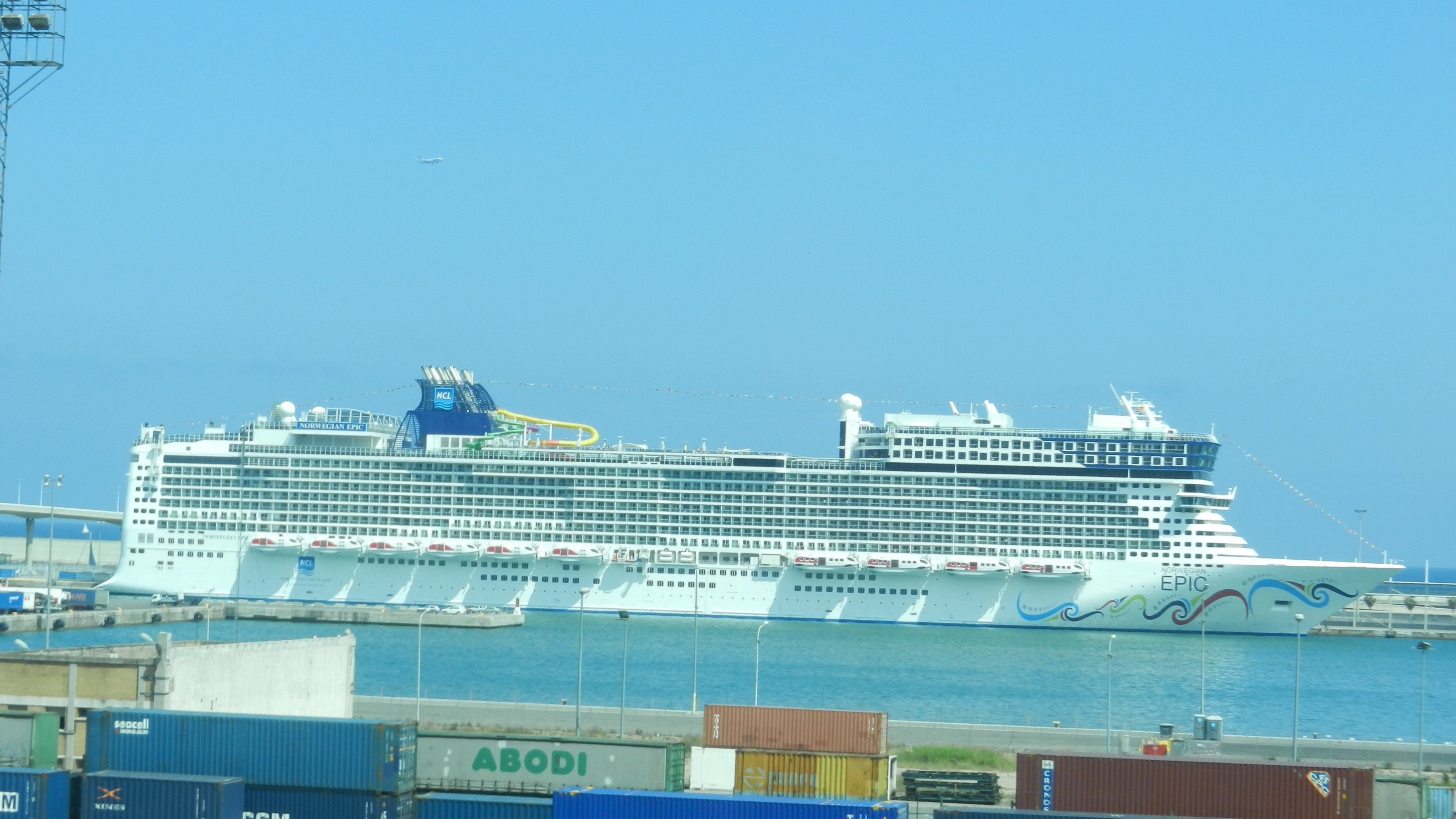 Круизный лайнер